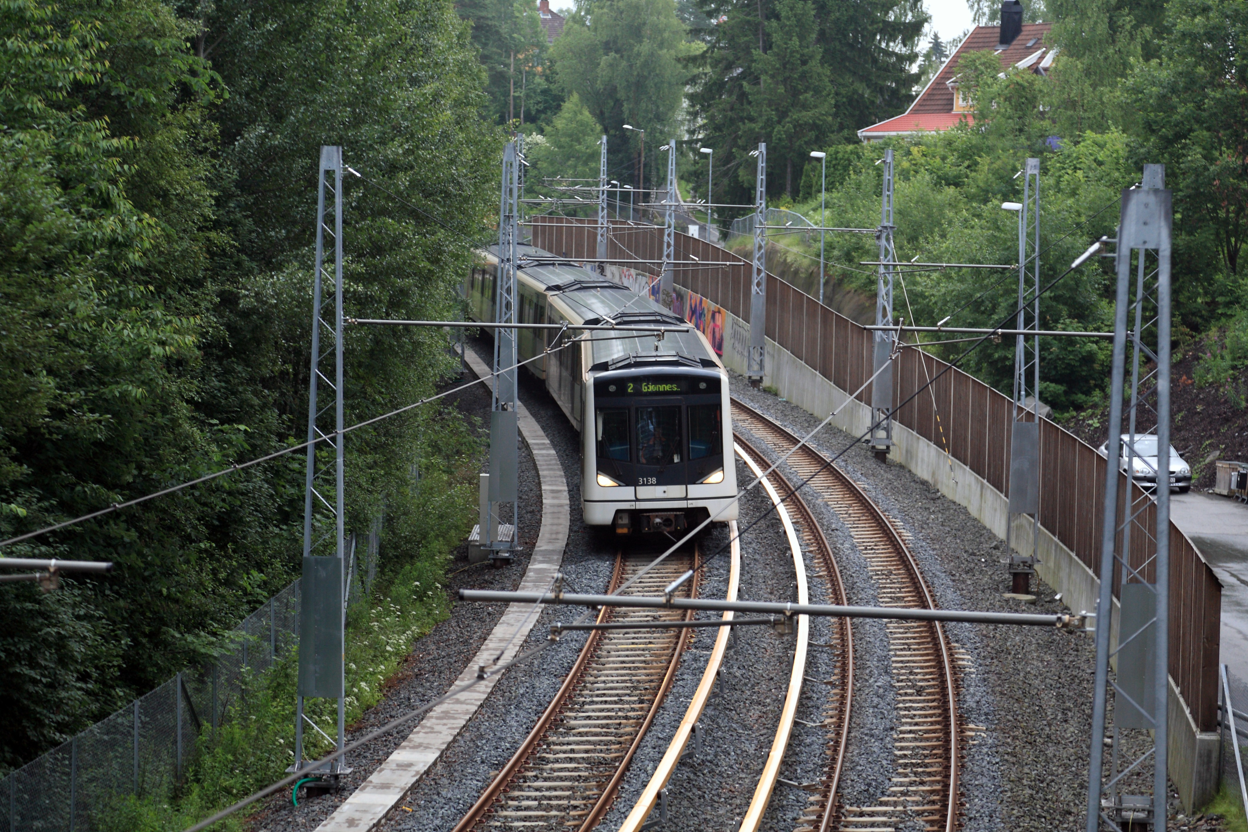 Zug der Linie 2 nach Gjønnes vor dem Hp Ringstabekk. Seit dem Umbau gibt es nur noch Einfachfahrleitung.